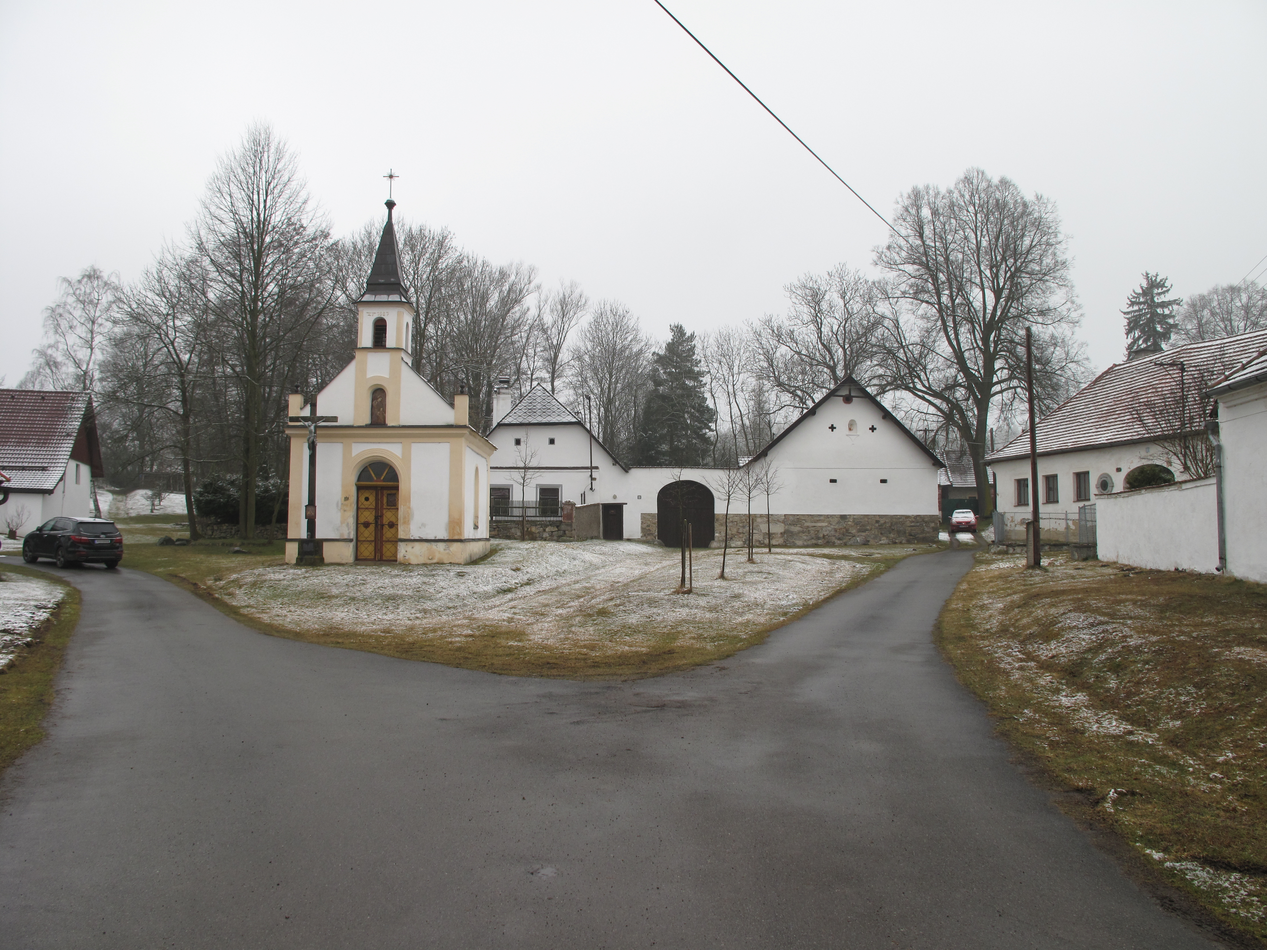 Náves v Marčovicích. Okres Strakonice, Česká republika.